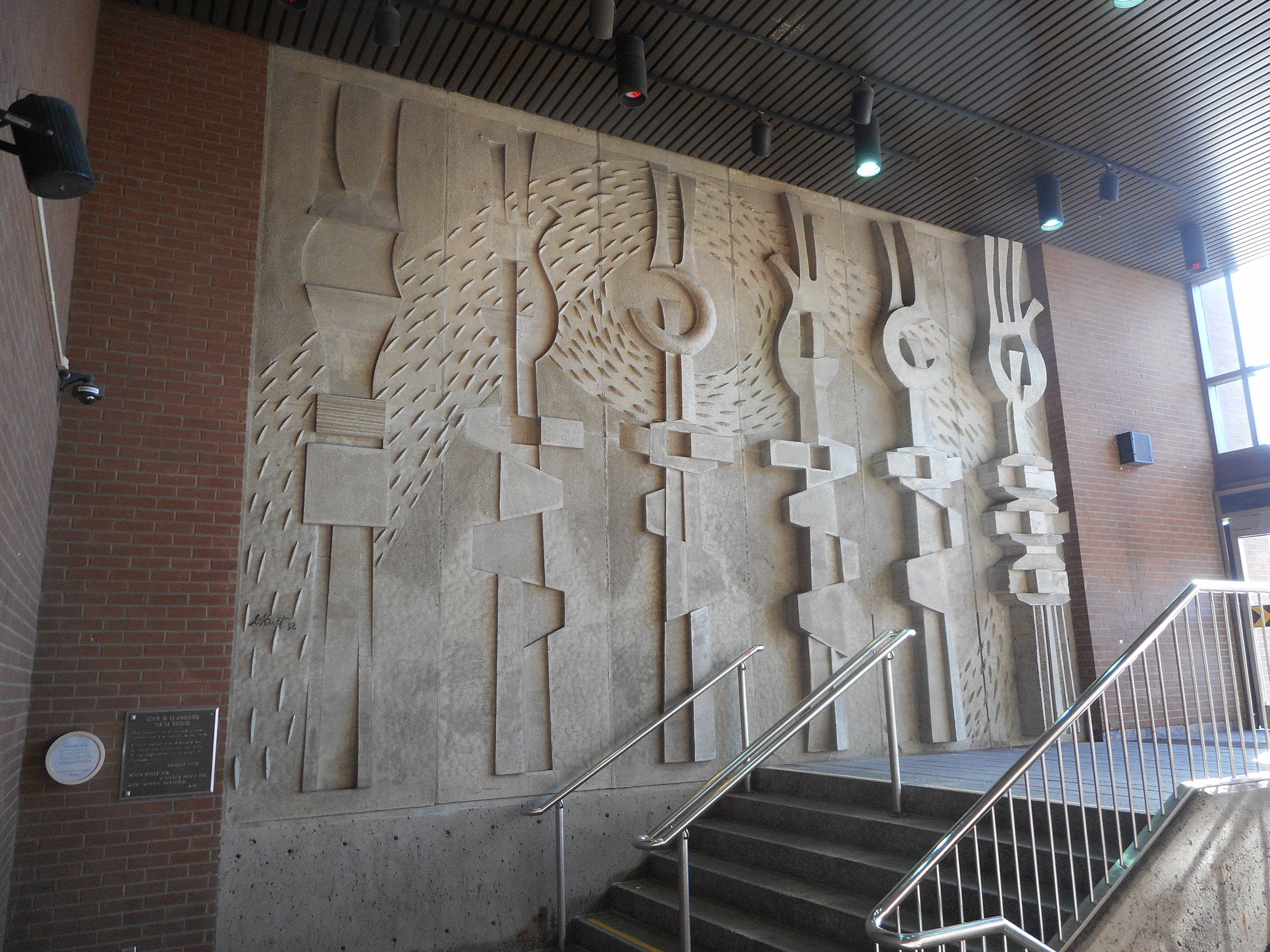 Réveil de la conscience par la solitude est une oeuvre de Jacques Huet, réalisée en 1983, située à l'entrée nord de la station de métro Henri-Bourassa, à Montréal.